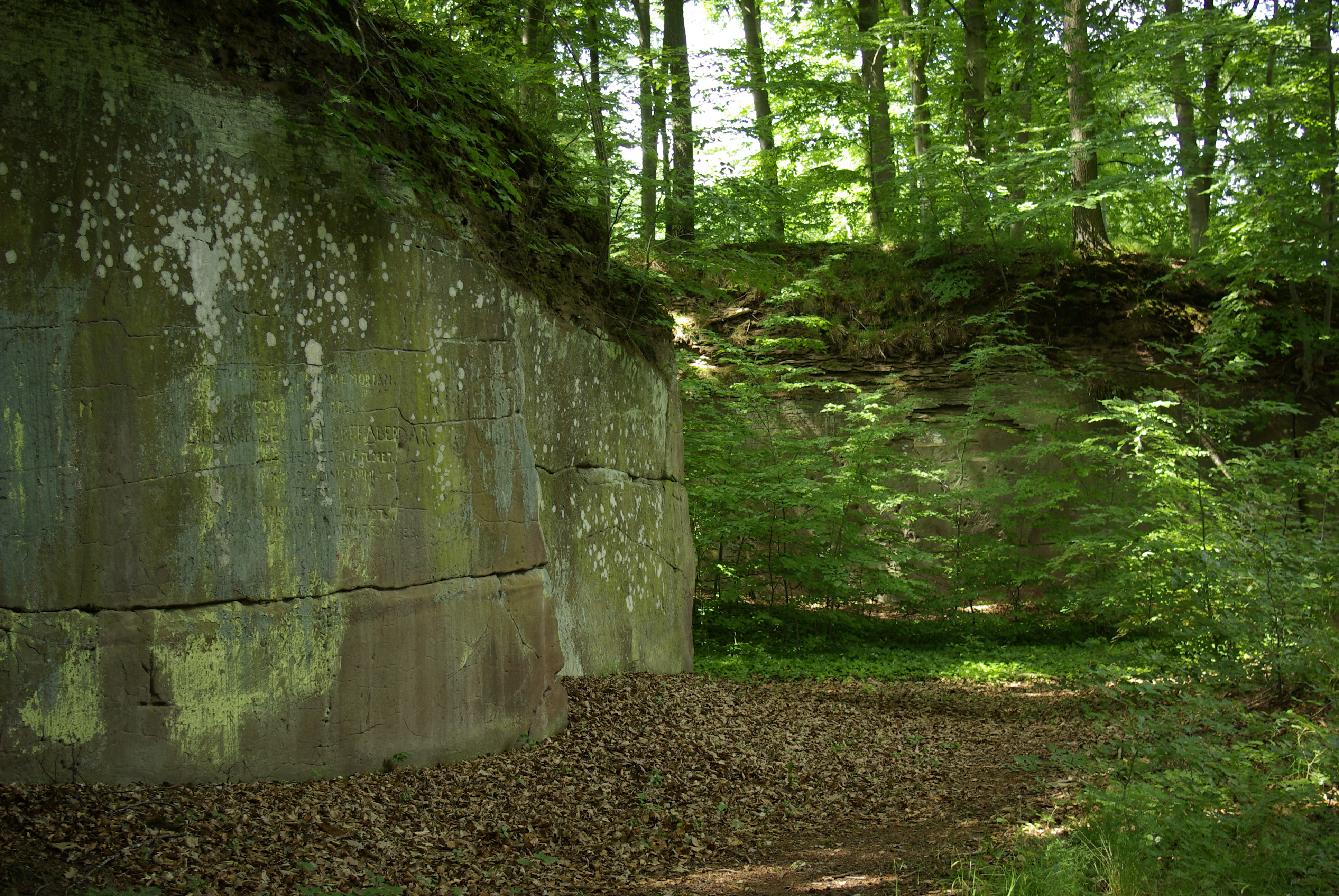 Die Fingalshöhle bei Obernzenn befindet sich auf dem Gebiet der Gemeinde Illesheim. Sie ist Geschützter Landschaftsbestandteil, Geotop und Baudenkmal.